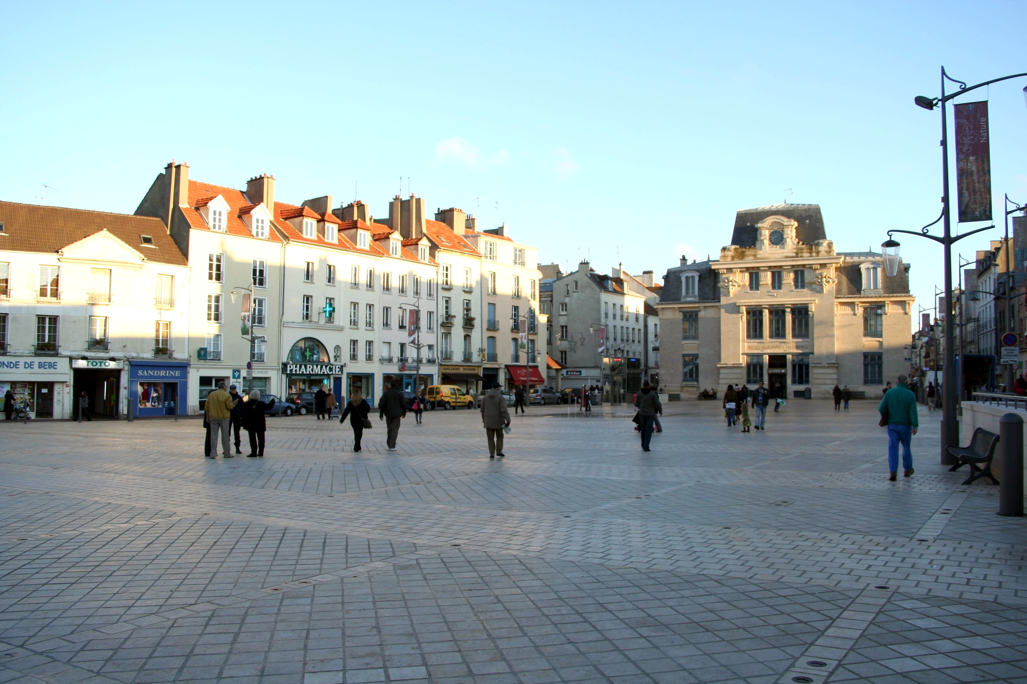 Place du marché-Neuf à Saint-Germain-en-Laye - Yvelines (France)